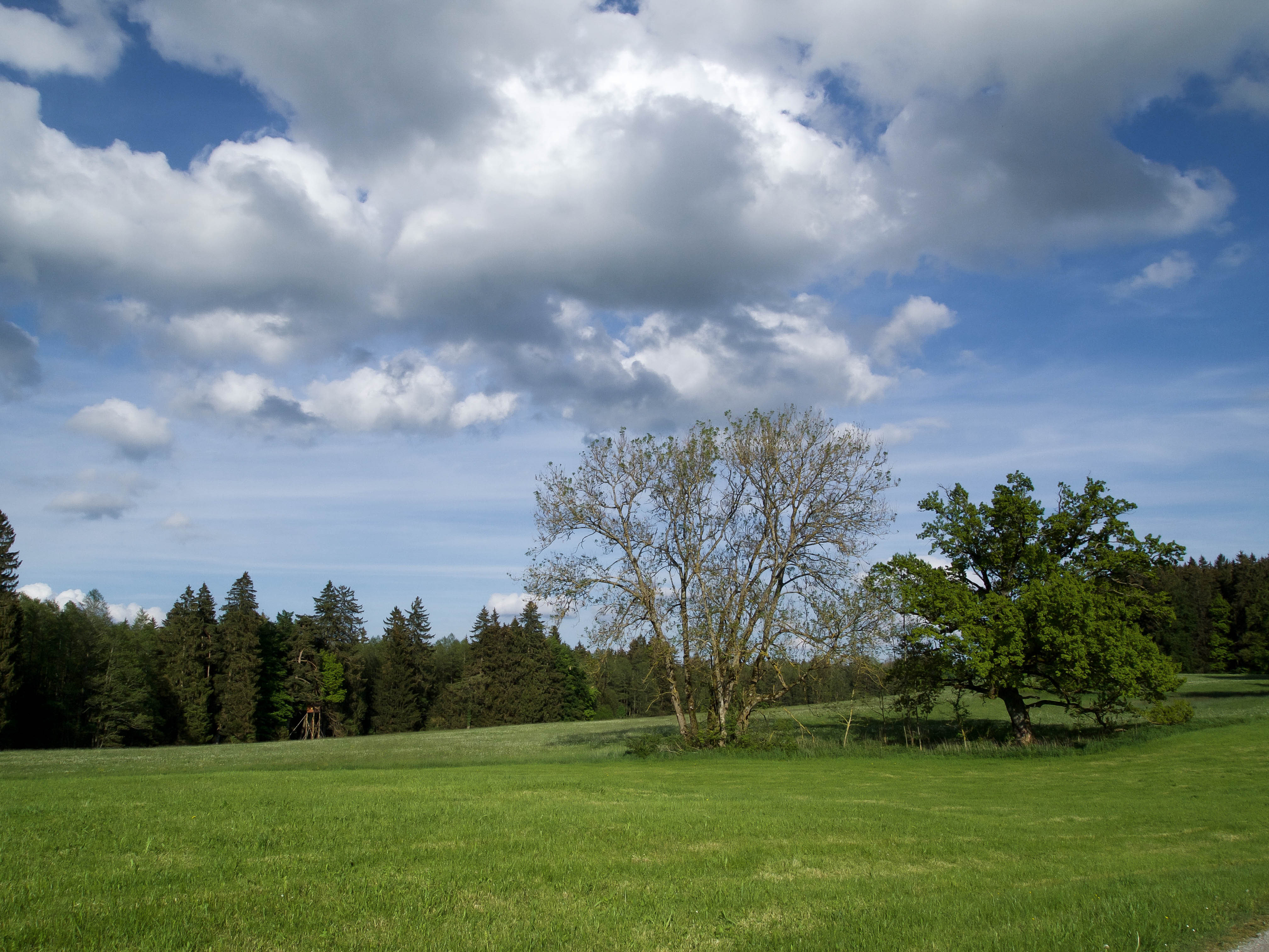 Blick vom Westen auf das Waldstück Rohrmoos bei Wessobrunn, Oberbayern. (NSG:BY-NSG-00067.01)_Rohrmoos.